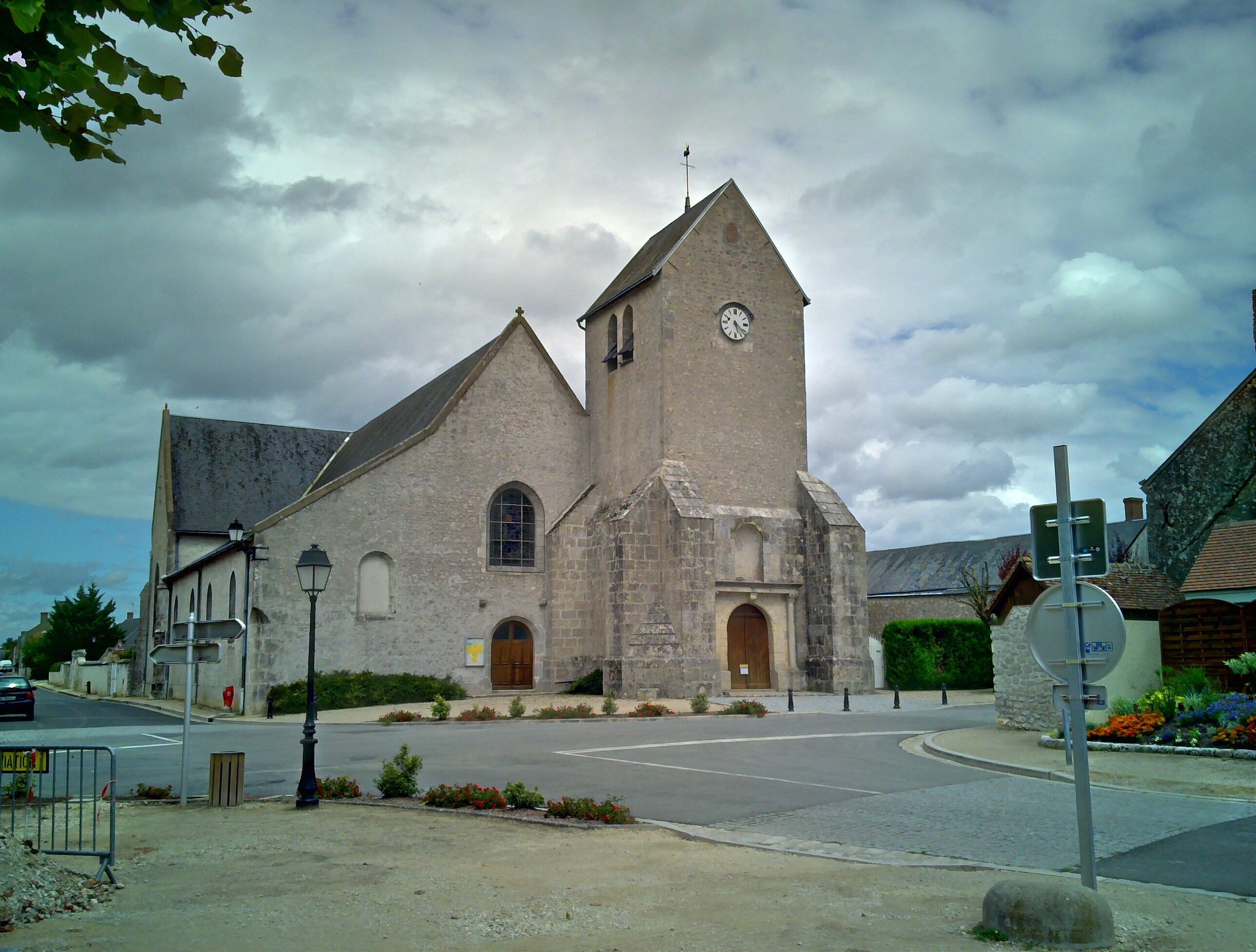 Česky: Kostel na návsi v Messas